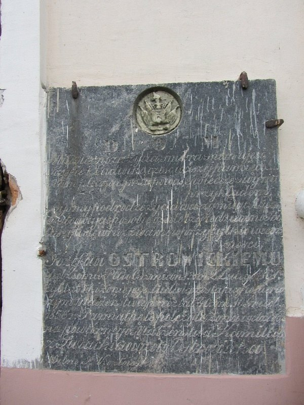 Астравец. Касцёл Святых Касмы і Даміяна